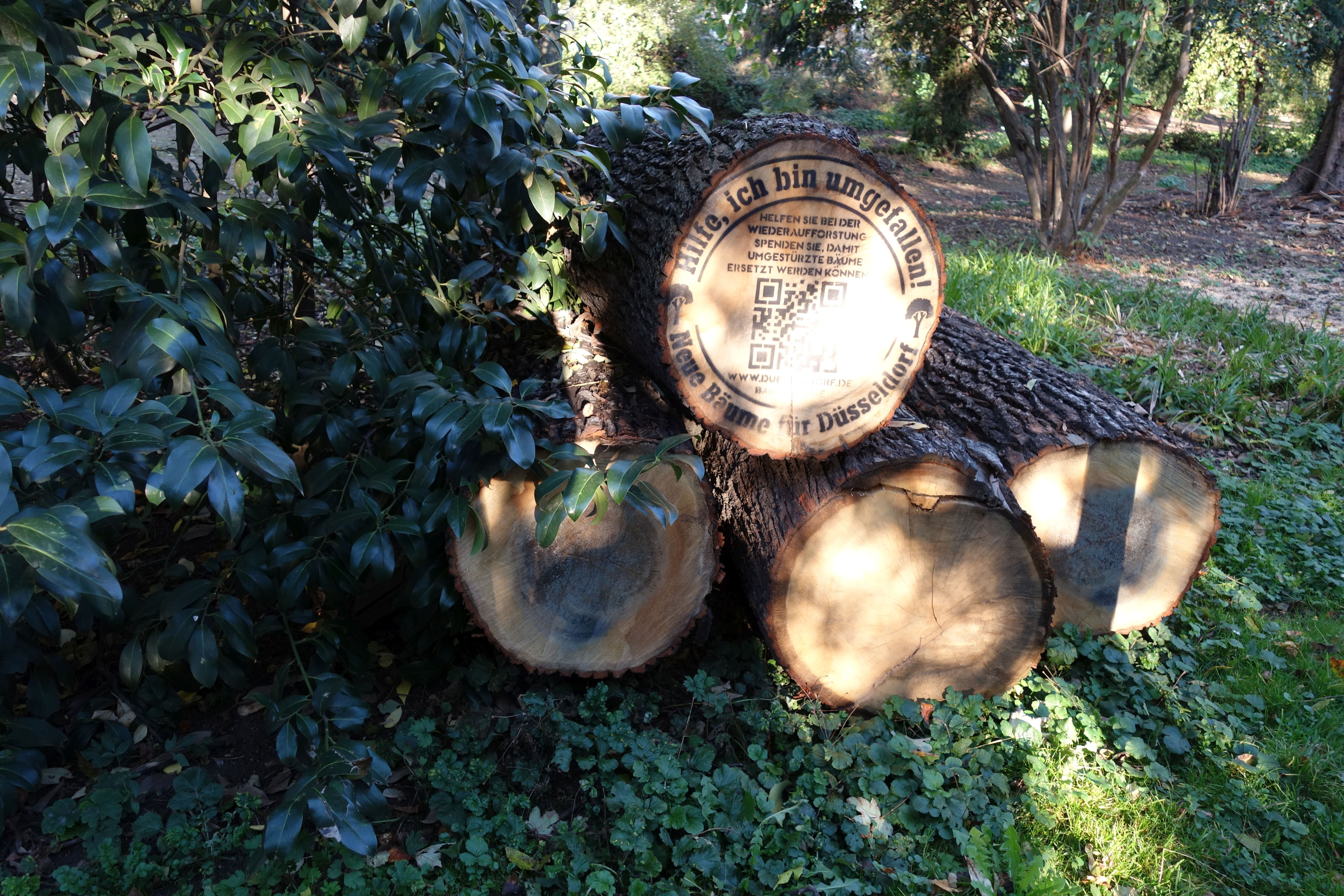 Hilfe, ich bin umgefallen - Neue Bäume für Düsseldorf. Aufruf zur Baumspende im Düsseldorfer Hofgarten nach den Verwüstungen durch das große Unwetter vom 19. Juni 2014. Helfen Sie bei der Wiederaufforstung. Spenden Sie, damit umgestürzte Bäume ersetzt werden können. Aufschrift auf einem abgesägten Baumstamm.